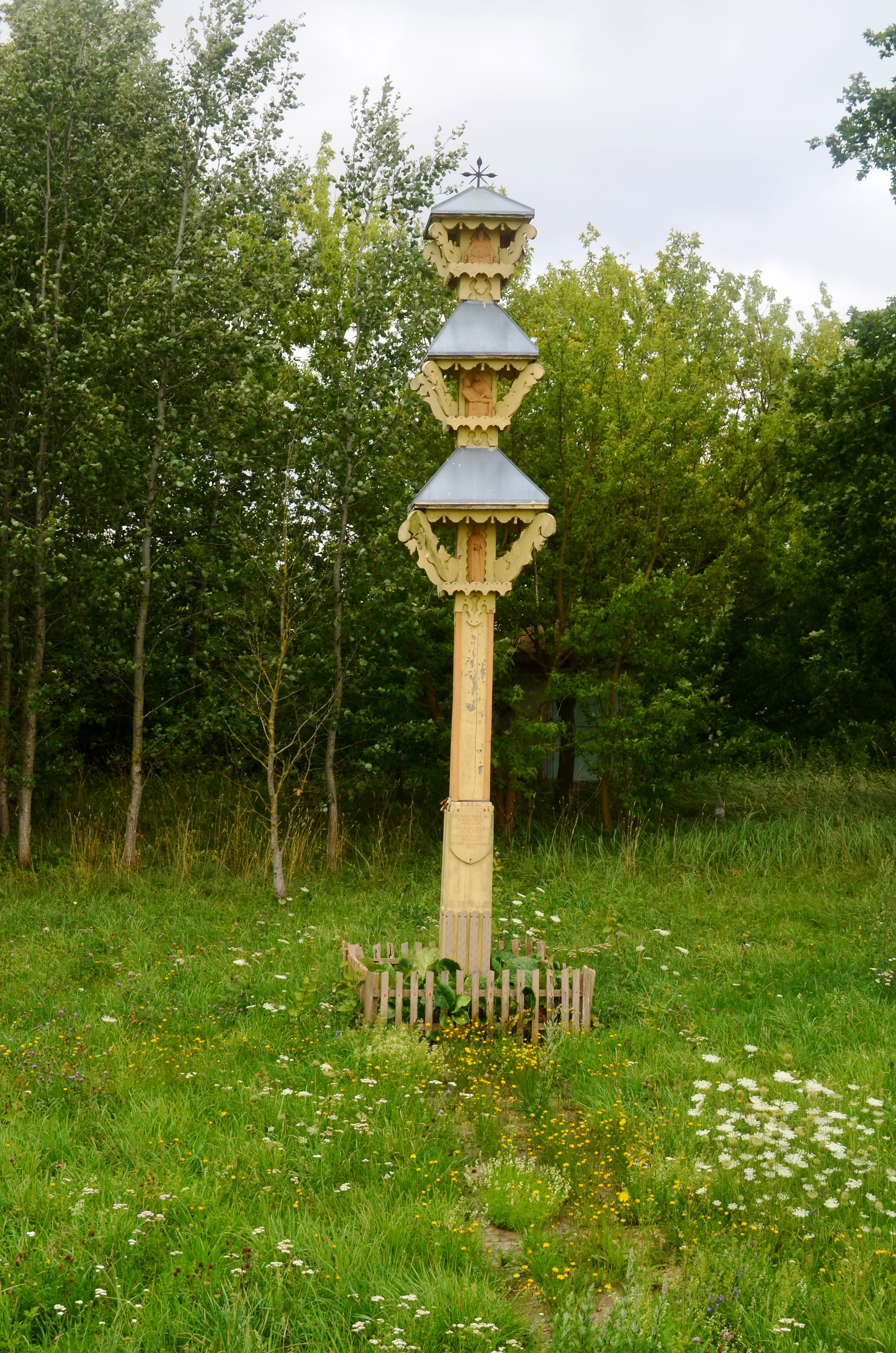 Vanagiškių koplytstulpis, Jonavos raj.